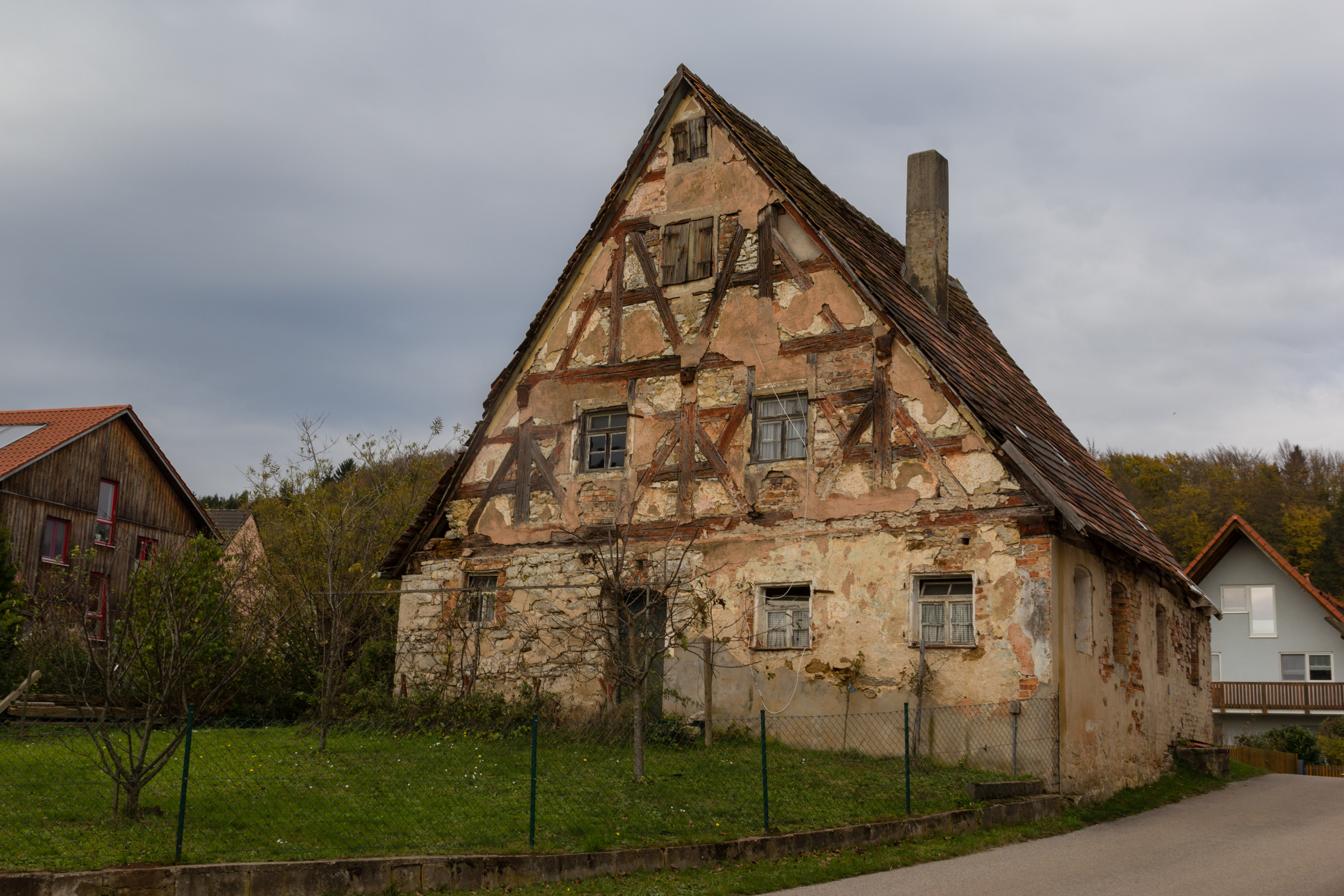 Hegnenberg, Altdorf, Wohnstallhaus, Eingeschossiger massiver Steildachbau mit Fachwerkgiebel, verputzt, 18. Jahrhundert